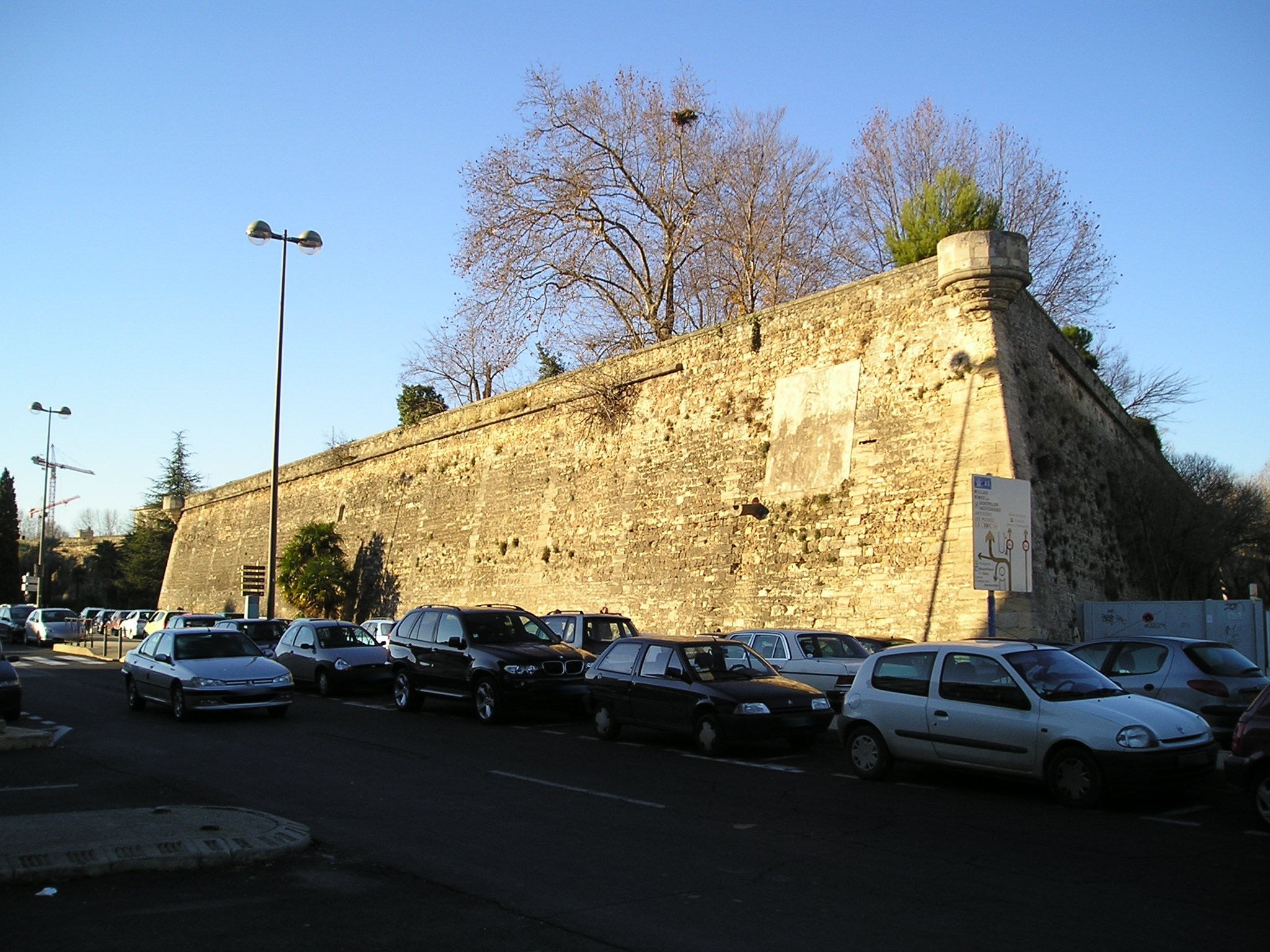 Le bastion de Ventadour, au coin sud-est de la Citadelle de Montpellier (Hérault, France).